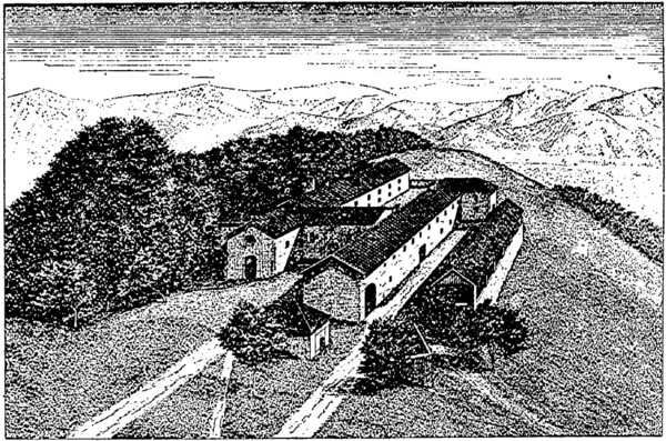 Illustration du livre écrit par un missionnaire anonyme, Notre-Dame de Parménie et ses pèlerinages depuis la fermeture de l'église (novembre 1880 et juillet 1896). Notice 1. sur la bienheureuse Béatrix d'Ornacieux, 2. sur soeur Louise, 3. sur la foire de Beaucroissant et le pèlerinage de Parménie, Impr. É. Vallier : Grenoble, 1897.